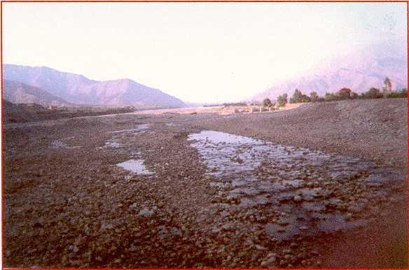 Cauce del río Ica aguas arriba de la ciudad. Período con caudal nulo. Autor: Alfredobi Fecha: 1999